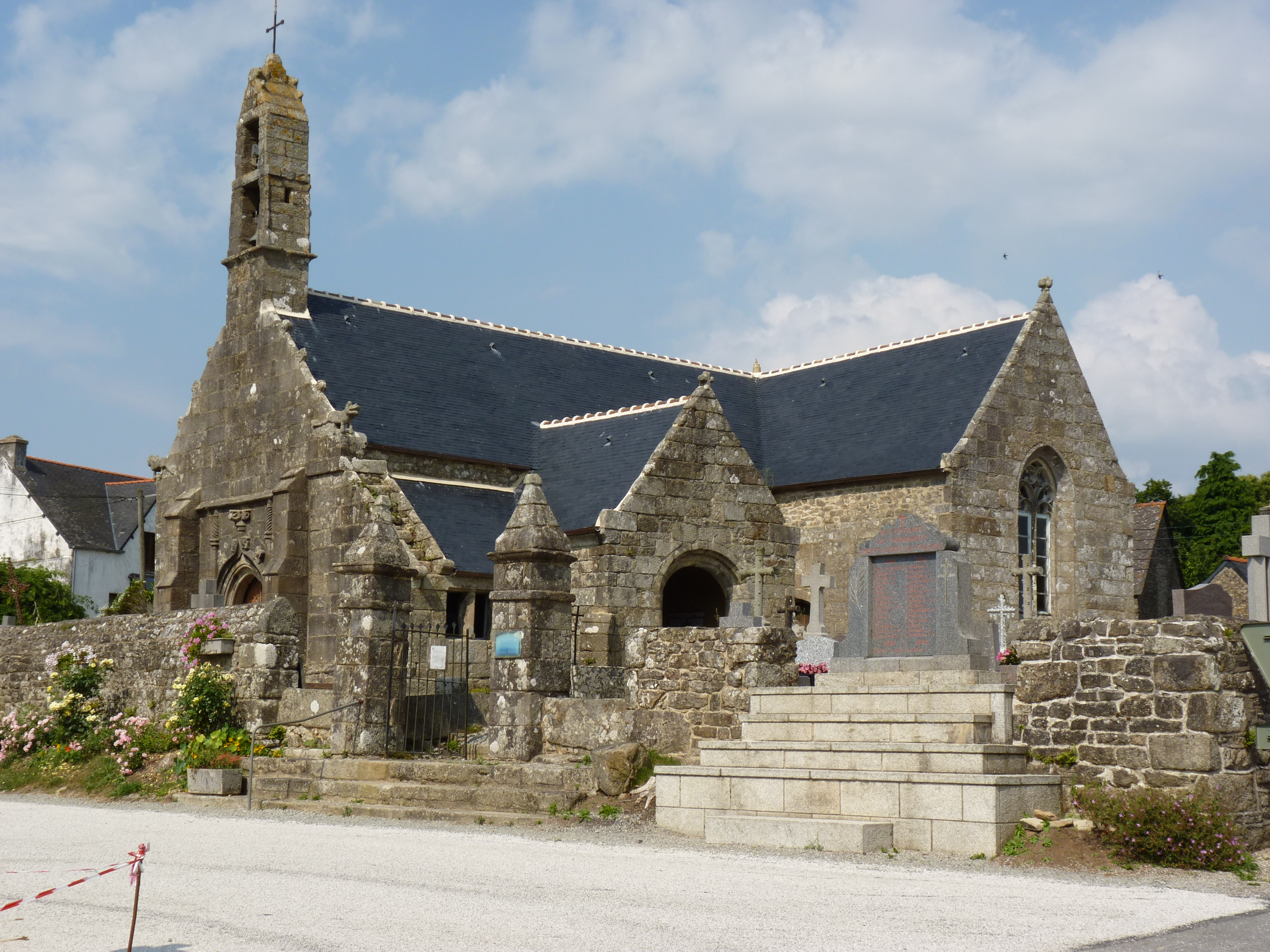 Église du 16ème siècle